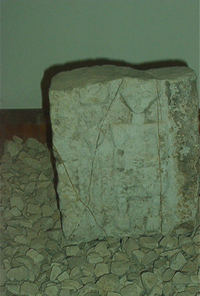 Stèle anthropomorphe musée de Bulla Regia